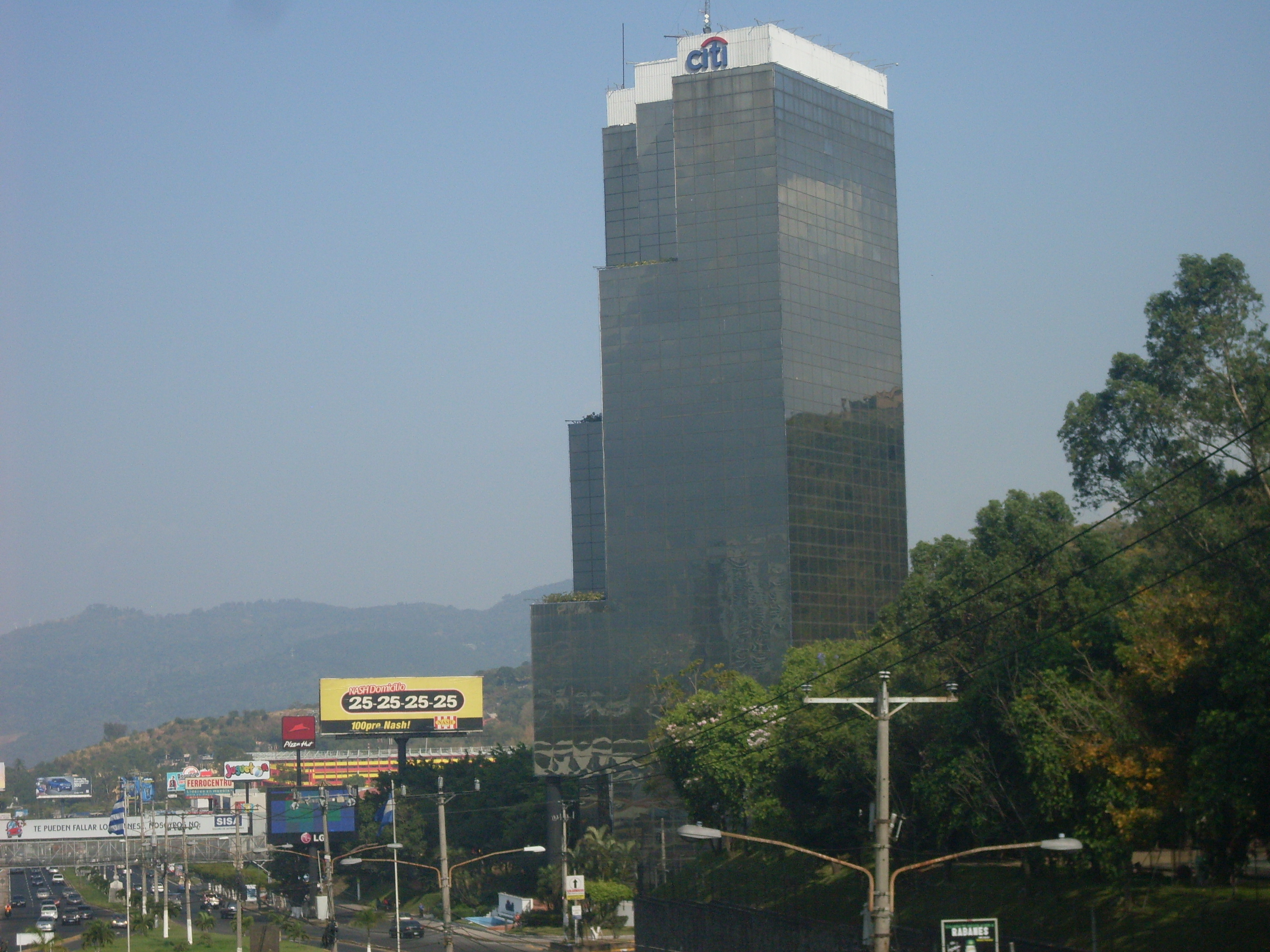 Torre Citi El Salvador con 79 Mts de Altura.